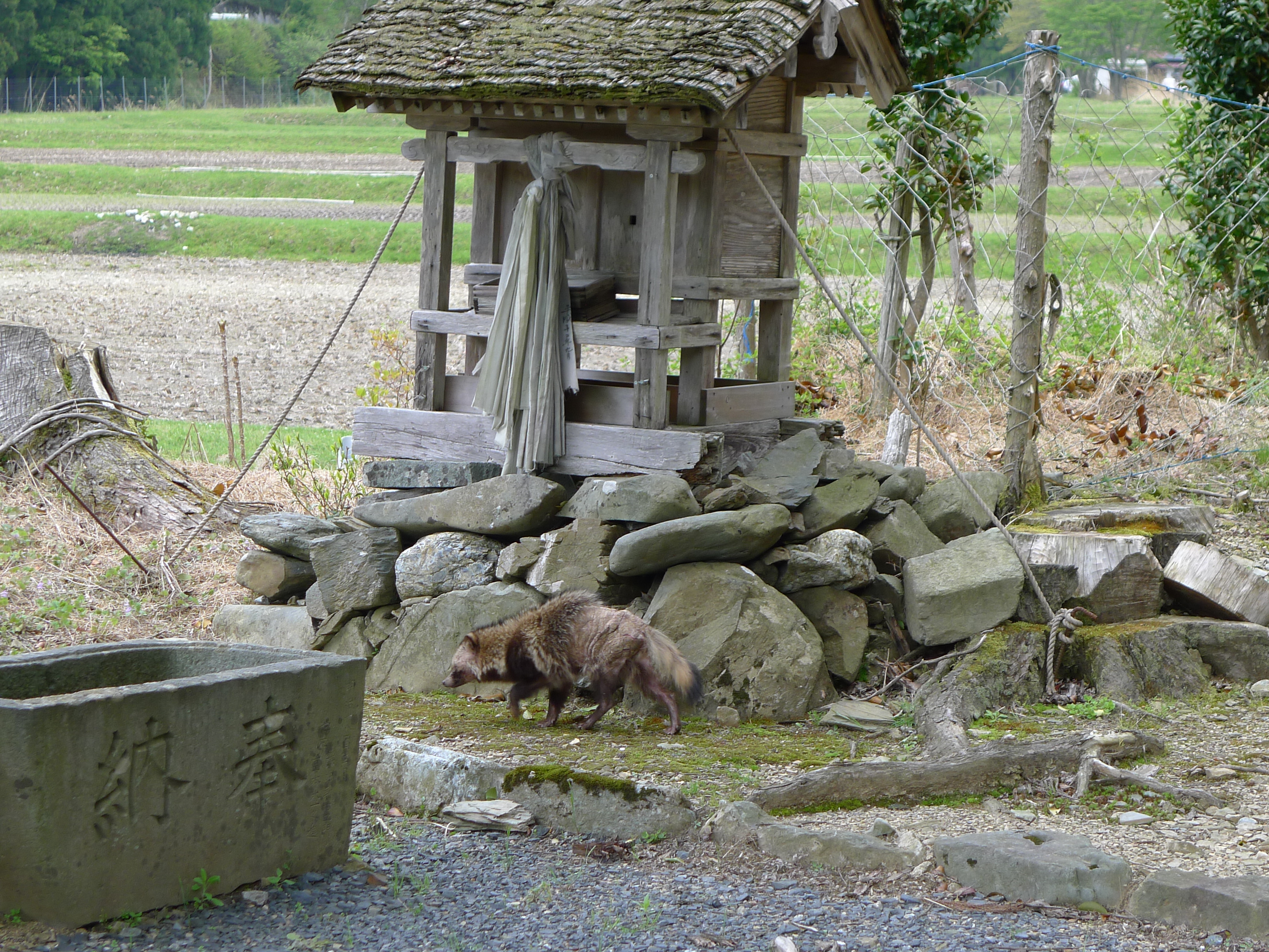 京都市左京区久多：上の宮神社の狸